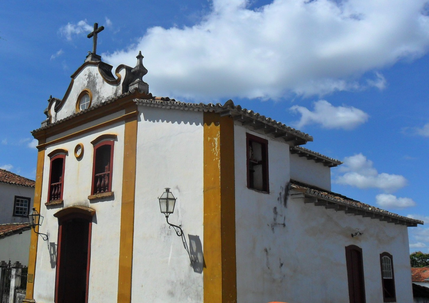 Capela do Bom Jesus da Pobreza em Tiradentes, Minas Gerais, Brasil